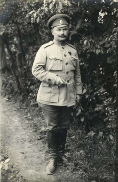 Vjačeslav Platonovič Trojanov, ruský generál